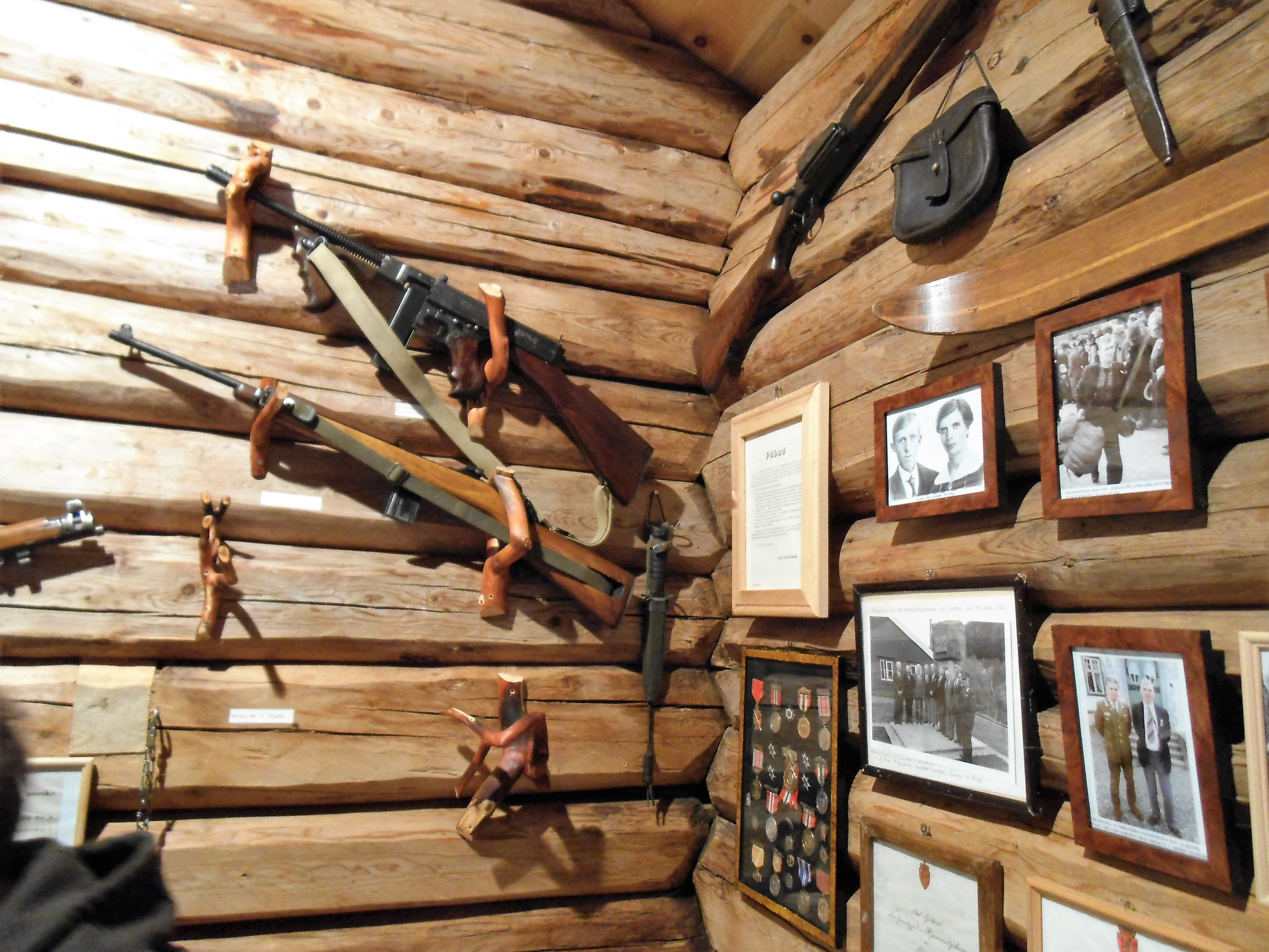 Sabotørmuseet på Grønlia gård på Gåsbakken. Museet er tilknyttet Hotell Norge og ble etablert i 2003. Her er noen autentiske våpen som sabotørene hadde.